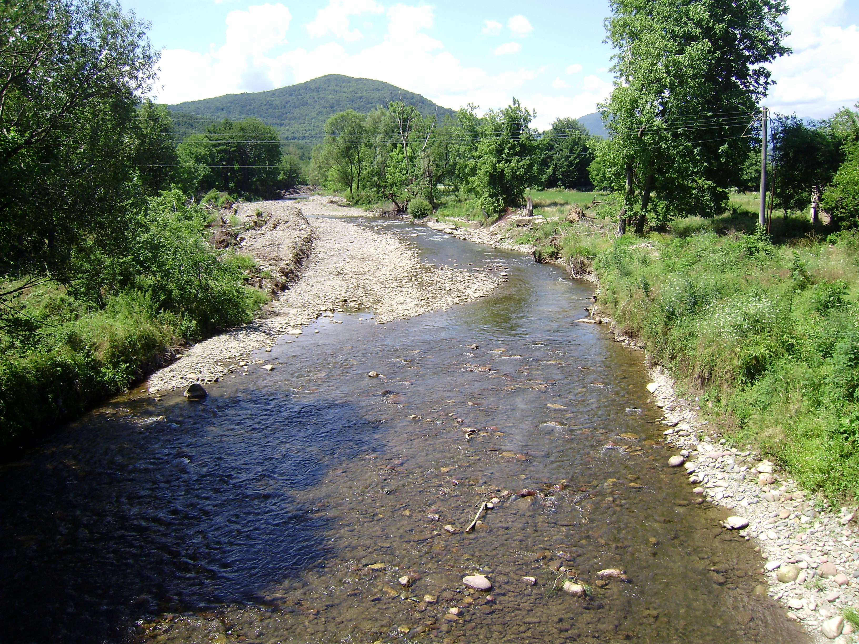 Река Дългоделска Огоста в село Гаврил Геново.